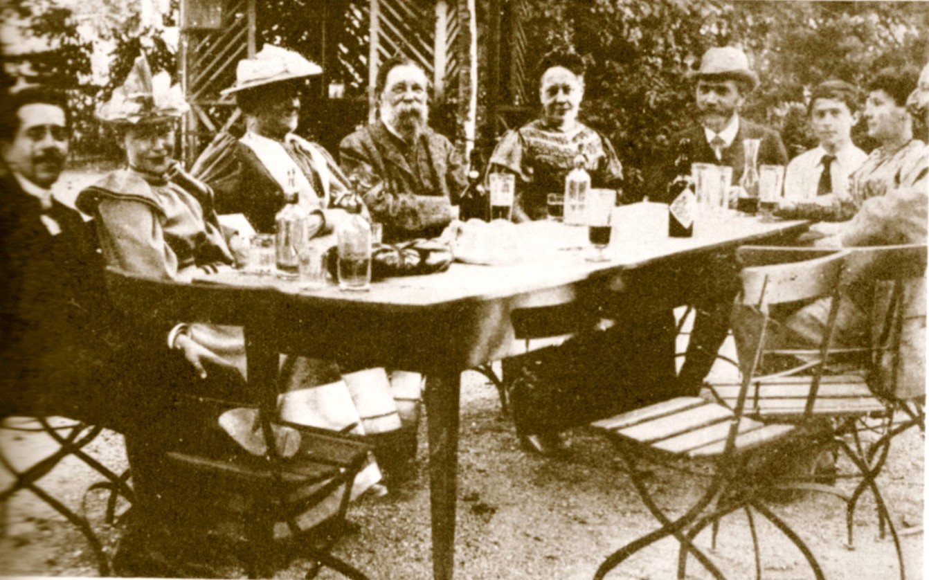 Im Gasthof zum Löwen Bendlikon bei Zürich 1893. Von links nach rechts: Ferdinand Simon (1862-1912), Friederike Simon, geb. Bebel (1869-1948), Clara Zetkin, Friedrich Engels, Julie Bebel, August Bebel, Ernst Schattner (1879-1944), Regina Bernstein, geb. Zadek, gesch. Schattner (1849/1852-1923) und Eduard Bernstein (teilweise abgeschnitten).